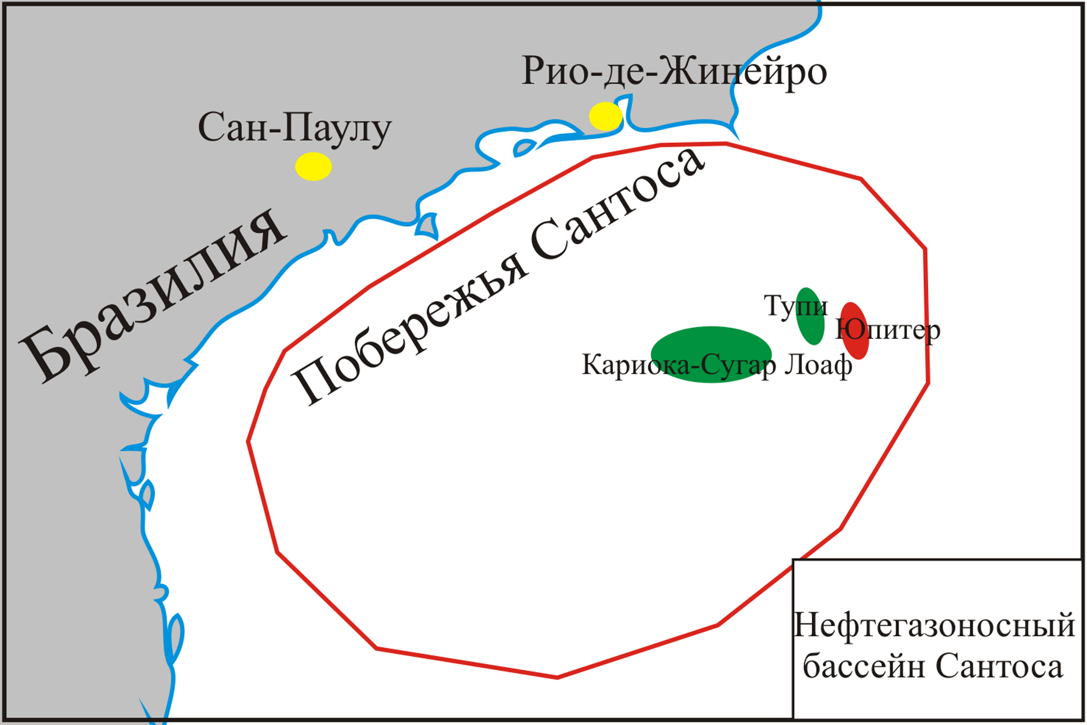 Карта нефтегазоносного бассейна